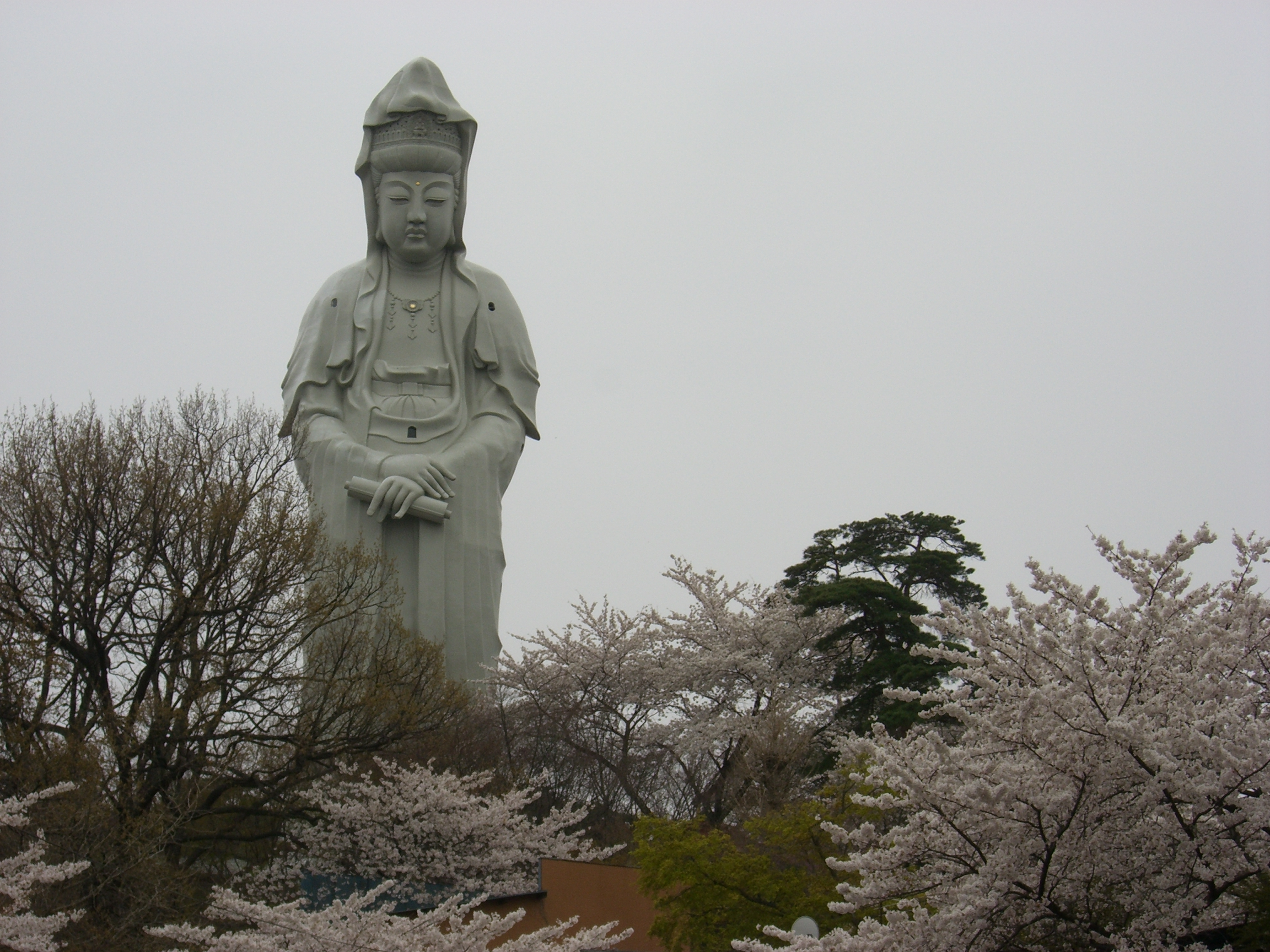 Byakui Kannon - Takasaki city